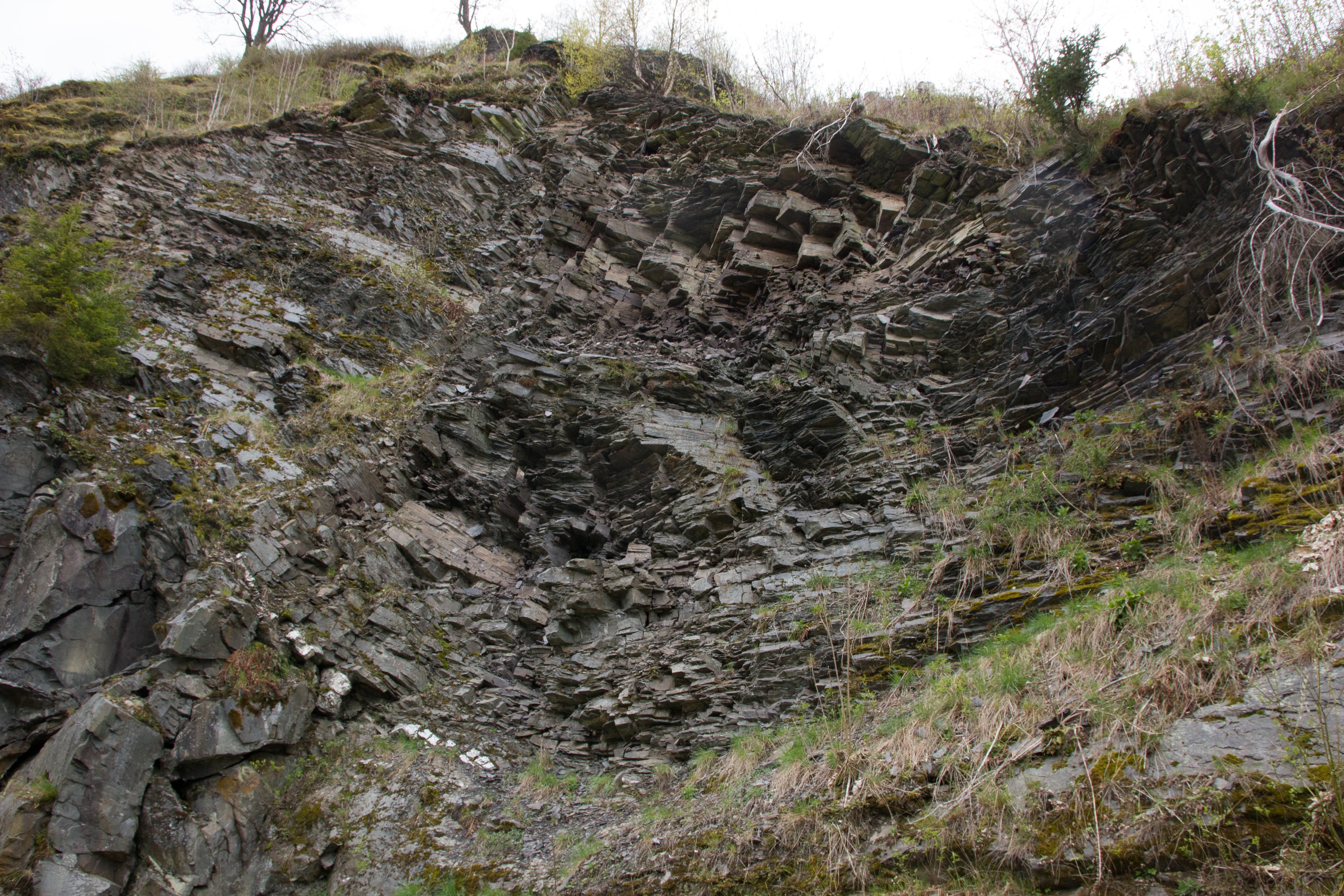 Geotop 476A042